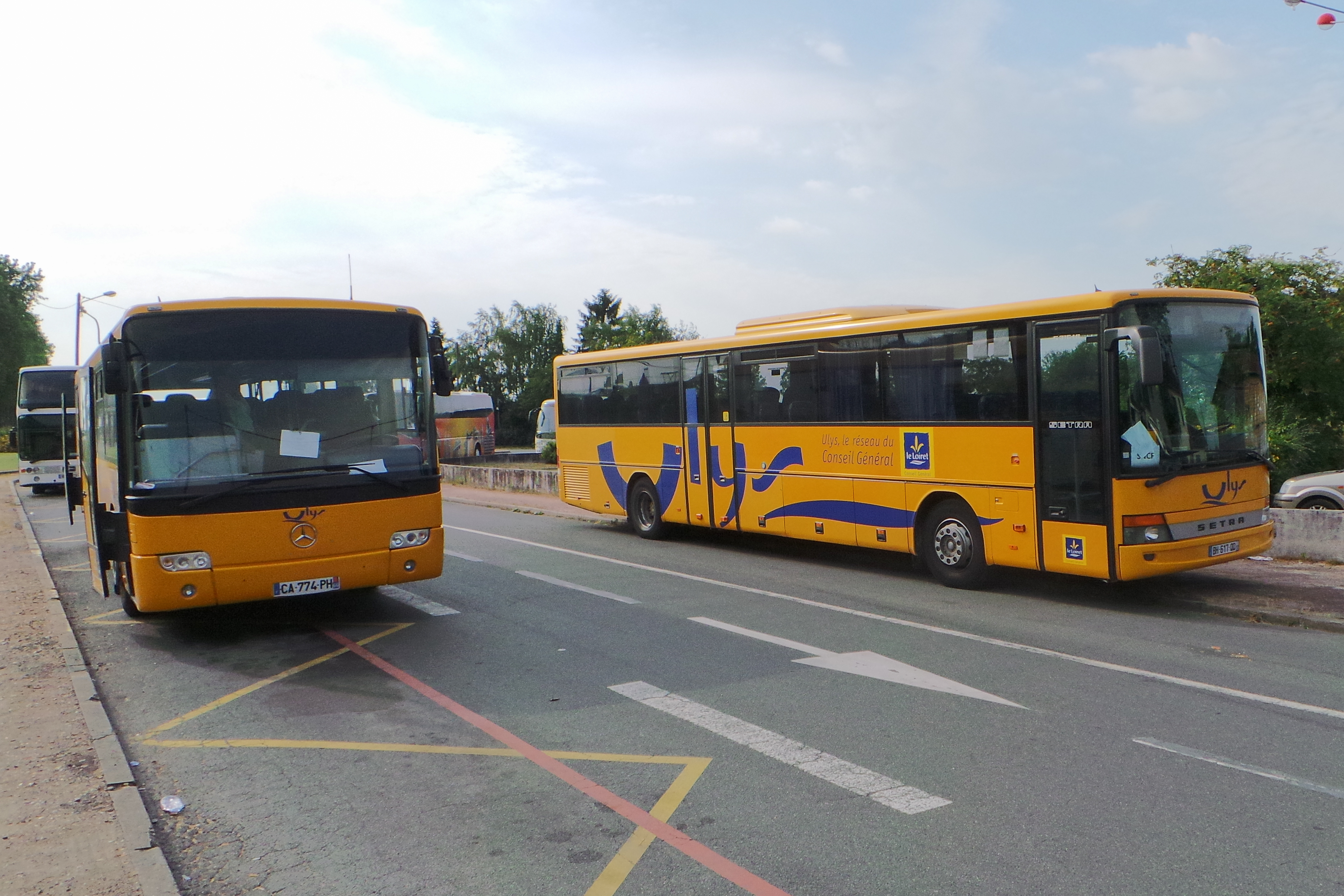 Gare de Marolles-en-Hurepoix - Marolles-en-Hurepoix - Essonne - France